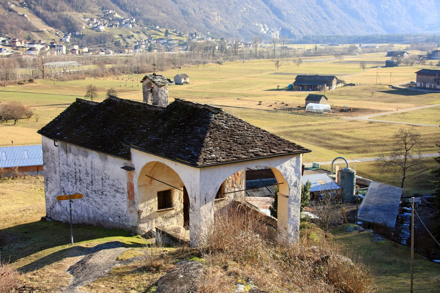 Chiesa di Santa Maria del Castello di Serravalle (CH-TI)